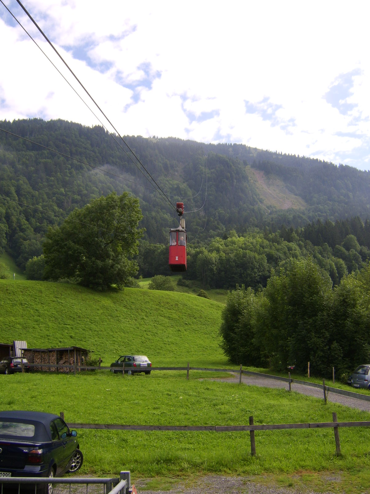 berghbahn Bezau